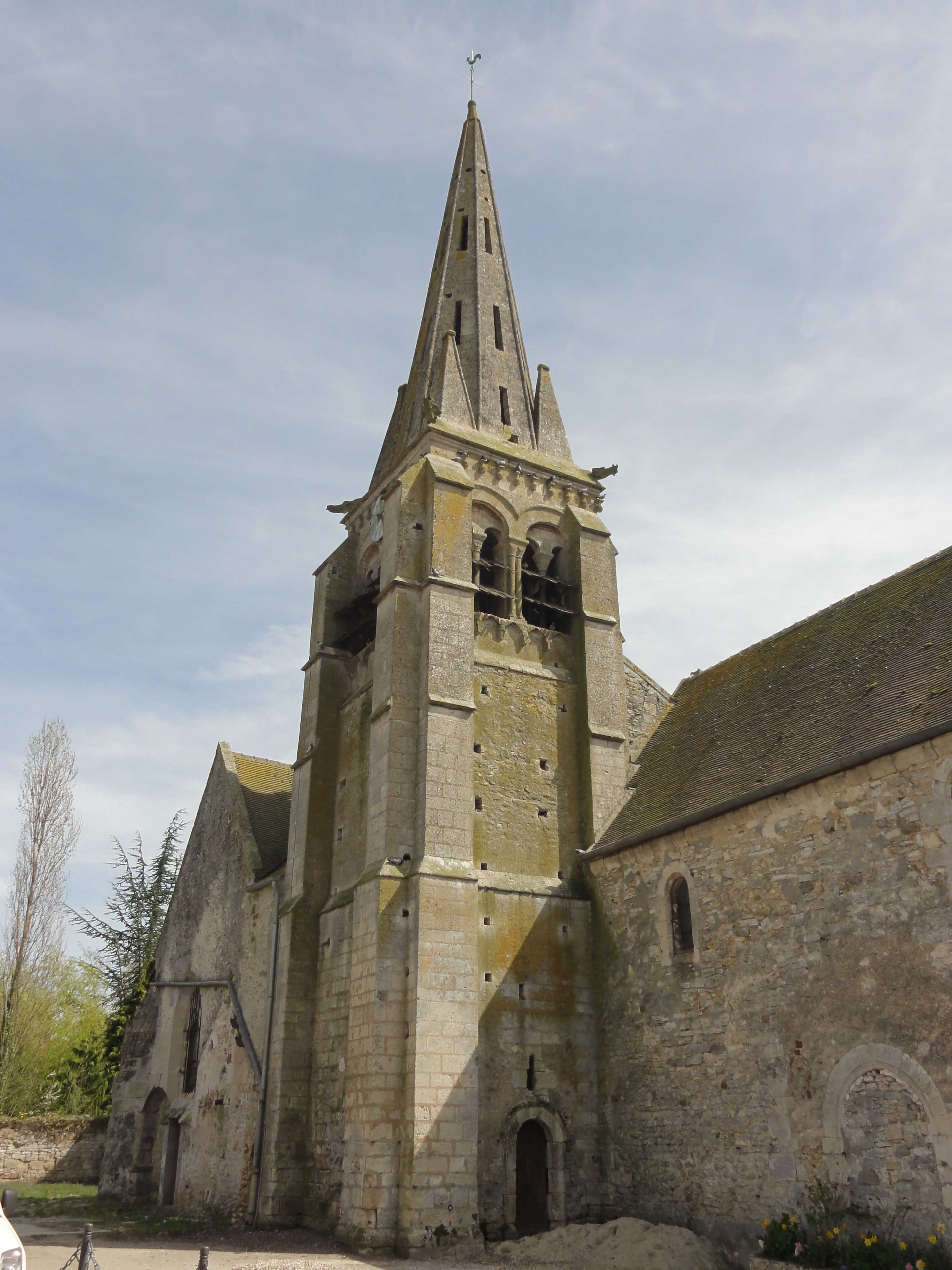 Église Saint-Caprais d'Auger-Saint-Vincent (voir titre).